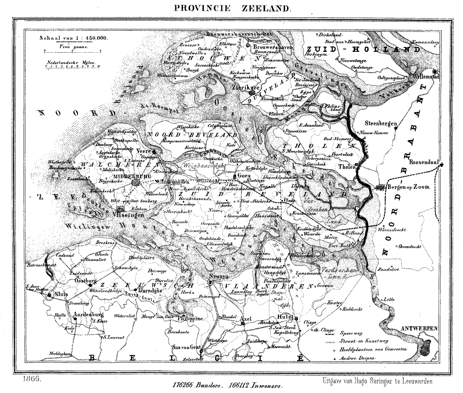 Kaart van Zeeland (provincie) uit Gemeente Atlas van Nederland, J. Kuyper 1865-1870, Uitgave Hugo Suringar Leeuwarden.